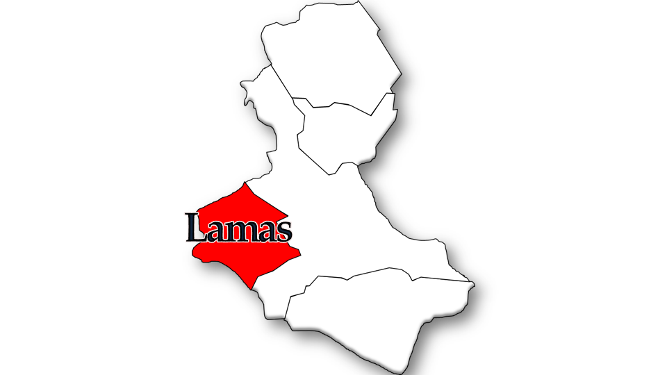 População